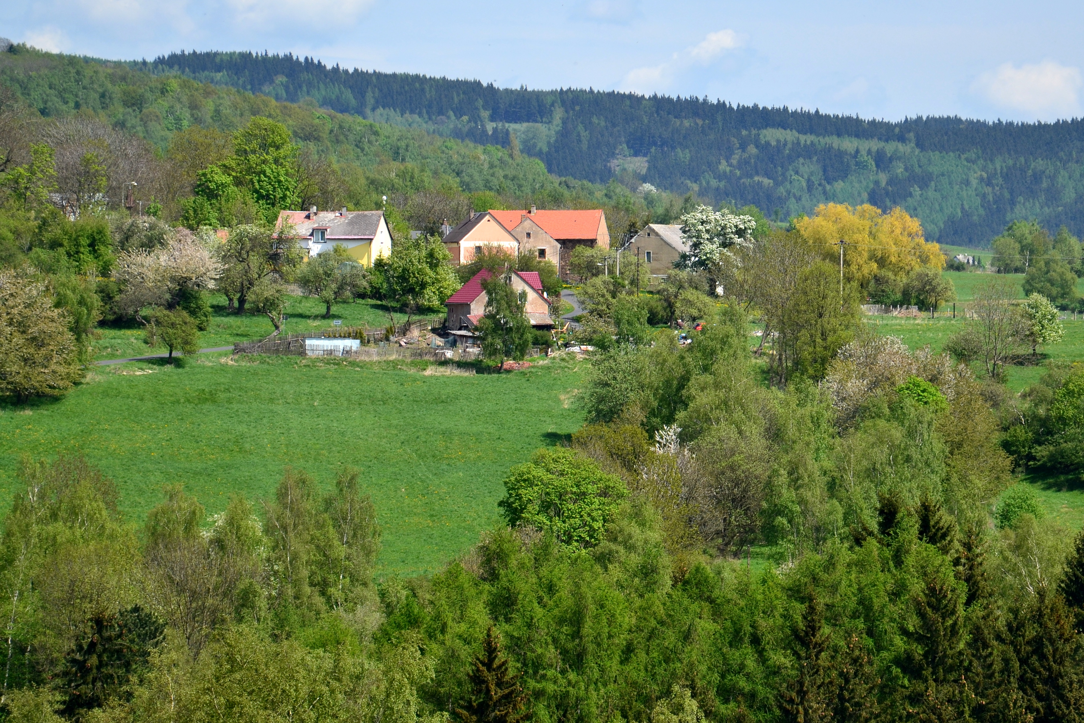 Pohled na Domašín z jihozápadu